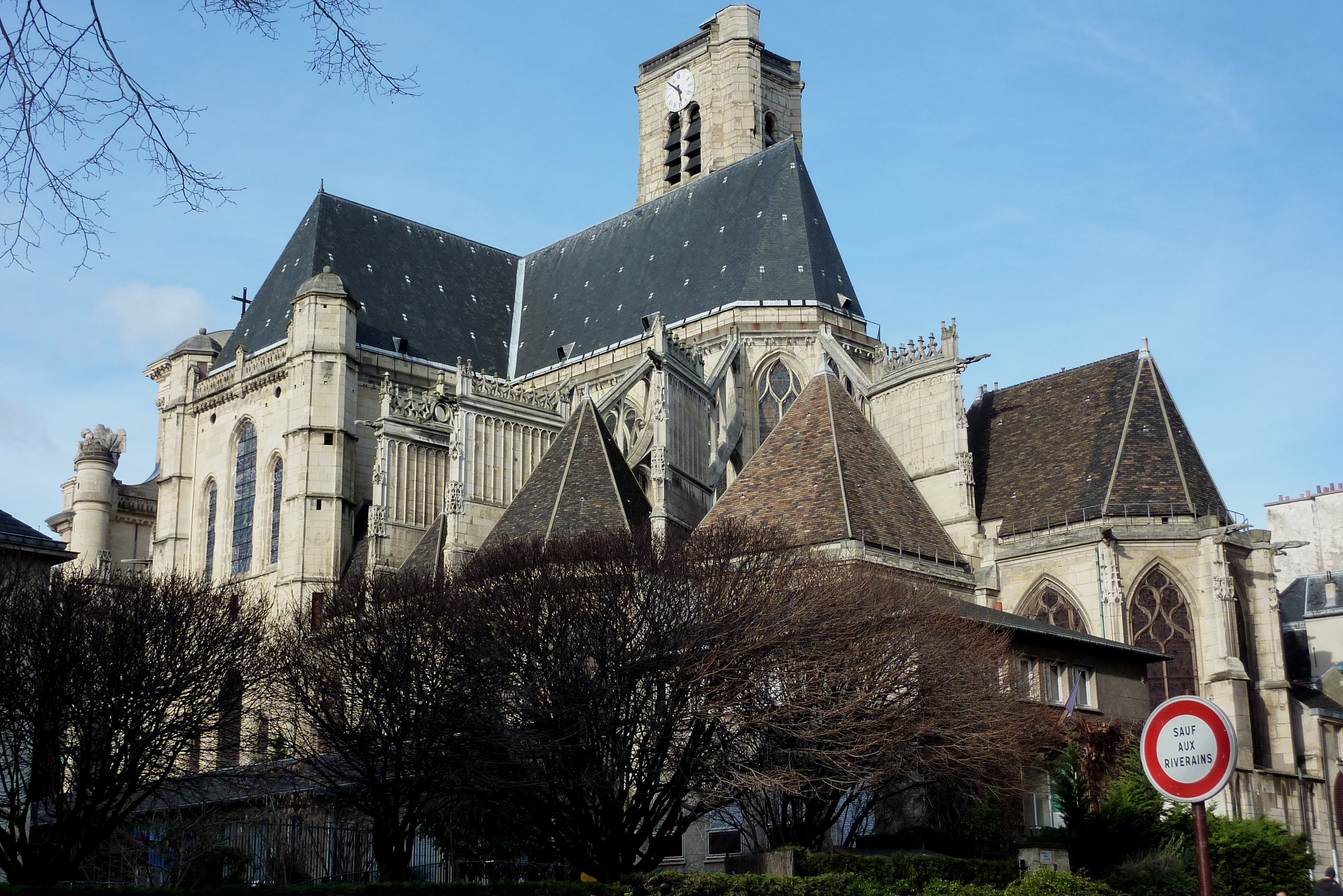 Kirche Saint-Gervais-Saint-Protais in Paris von Südosten